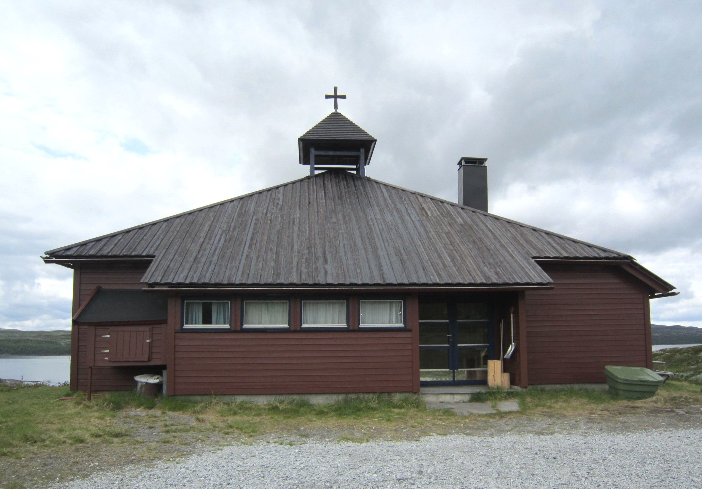 Vats fjellkirke (Ål kommune)